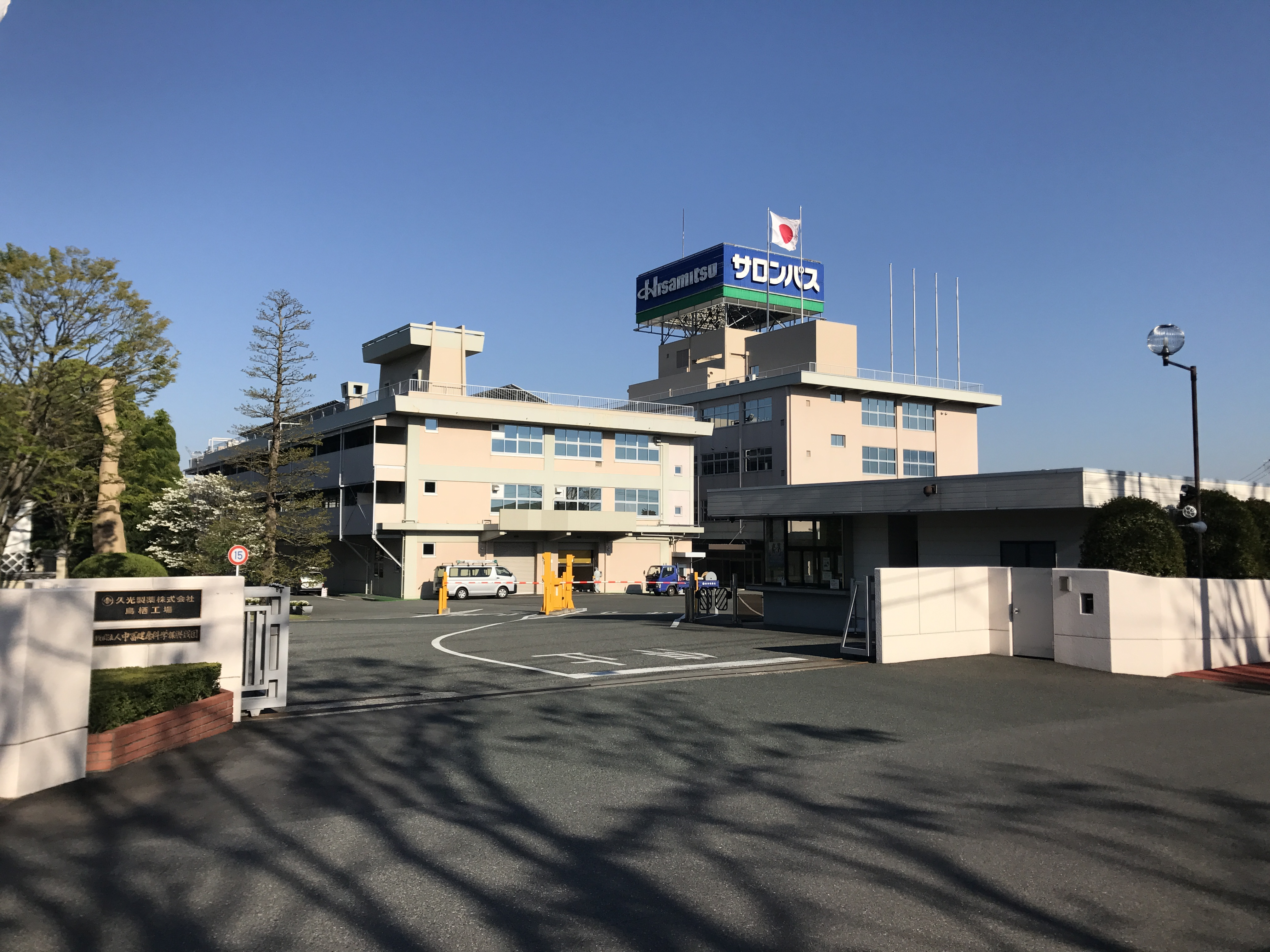 久光製薬本社・鳥栖工場